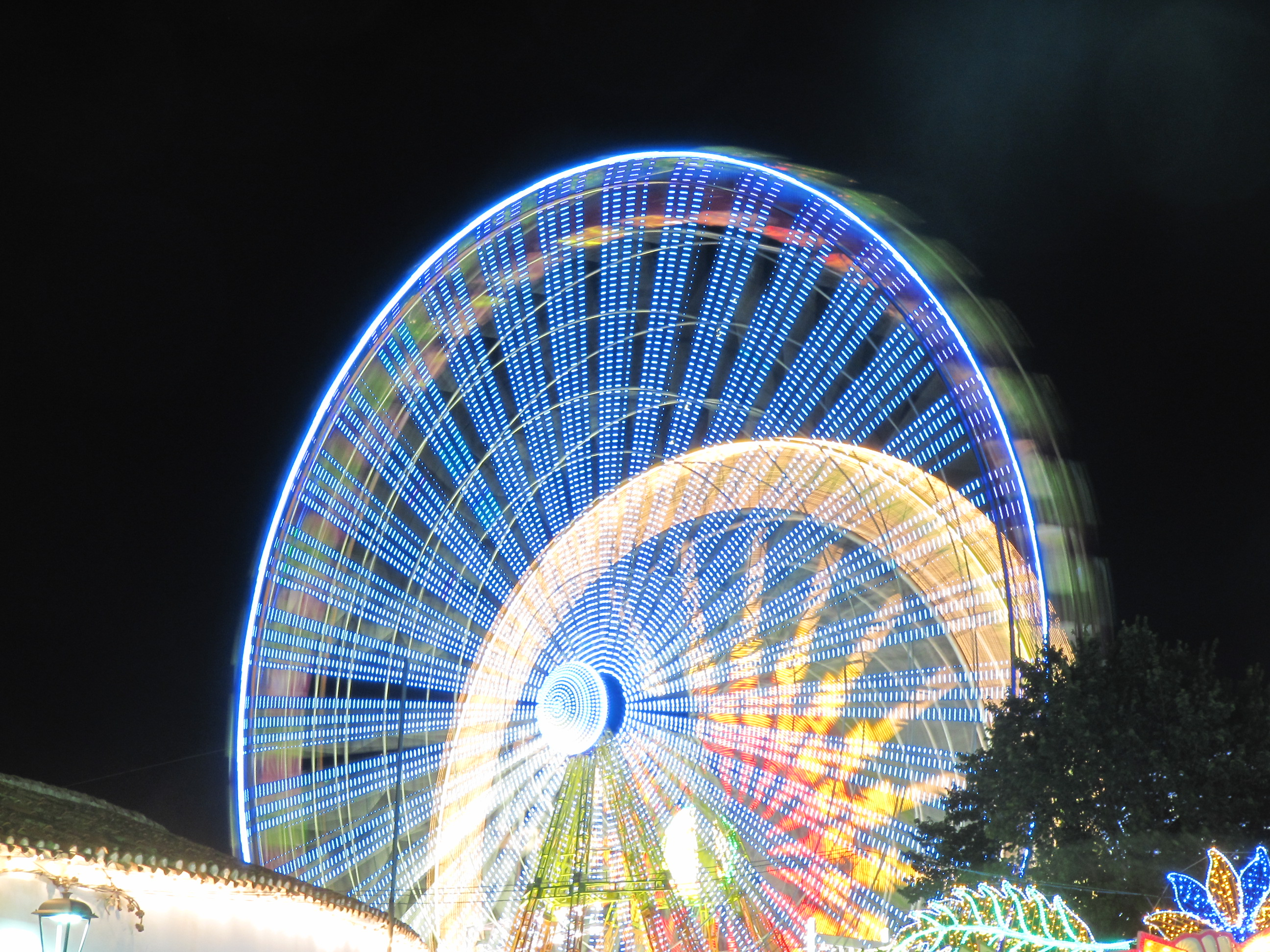 Norias. Feria de Albacete 2010